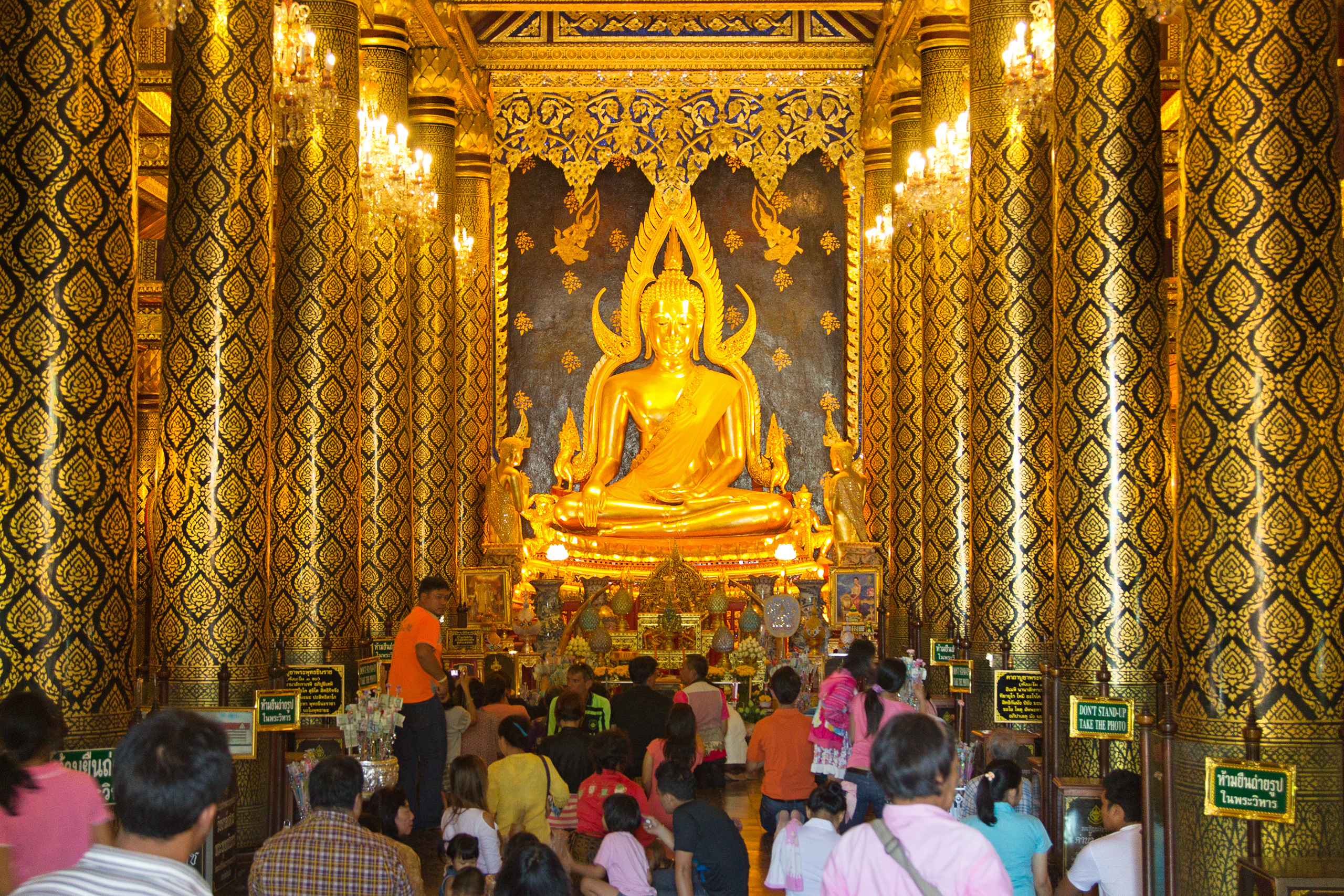 Phra Buddha Jinaraj, Wat Phra Si Rattana Mahathat, Phitsanulok, Phitsanulok Province, Thailand